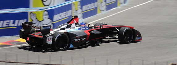 Jacques Villeneuve all'ePrix di Punta del Este 2015